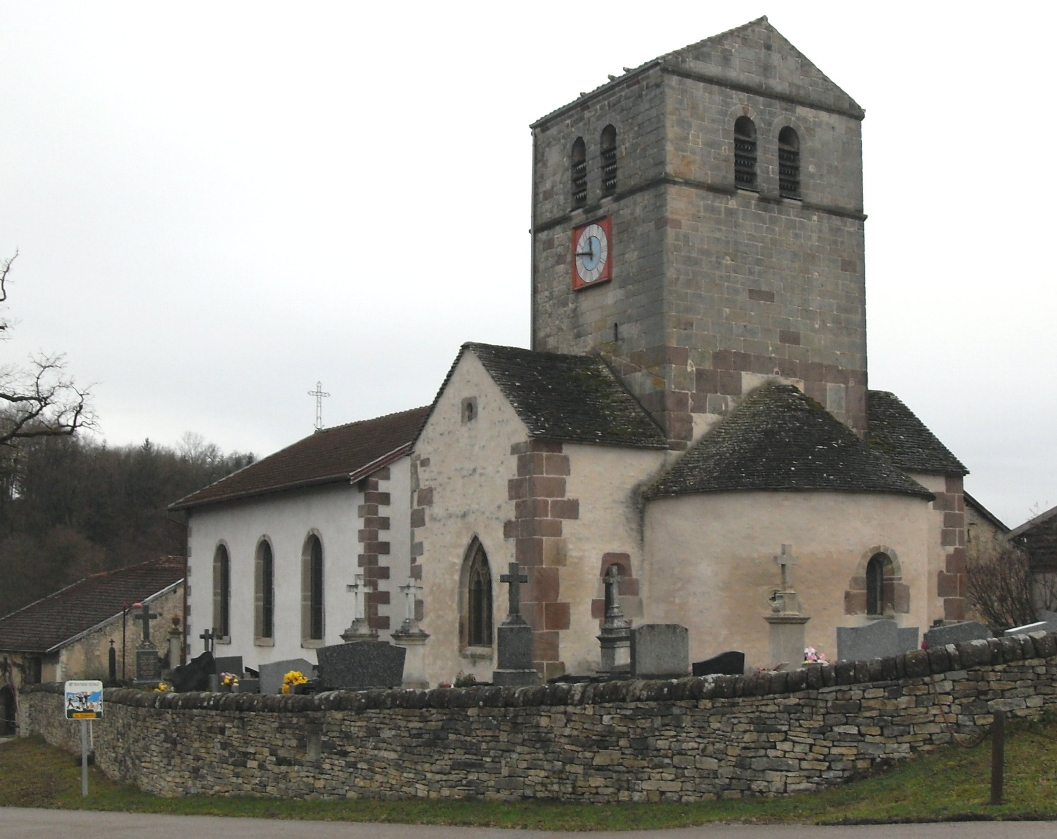 L'église Saint-Paul à Gorhey